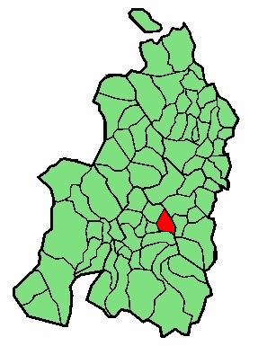 aipaturiko udalerriaren kokapena Nafarroa Beherean